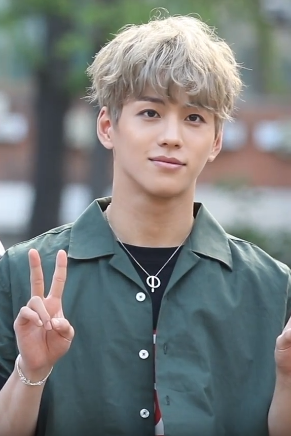 7월 20일 오전 KBS 뮤직뱅크에 마이틴이 리허설 녹화에 참여하기 위해 출근하고 있다